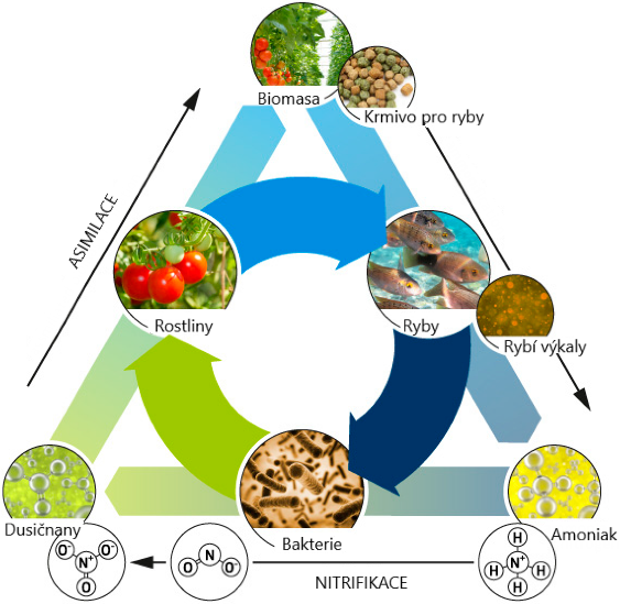 Obrázek schématicky znázorňuje základní princip akvaponického systému. Vstupem do systému je voda a krmivo pro ryby, výstupem je biomasa ryb a rostlin. Klíčovou roli v systému hrají bakterie, především nitrifikační a nitratační. Tyto bakterie umožňují přeměnu toxické odpadní látky od ryb (amoniaku) na méně toxické formy a umožňují recirkulaci vody v systému.